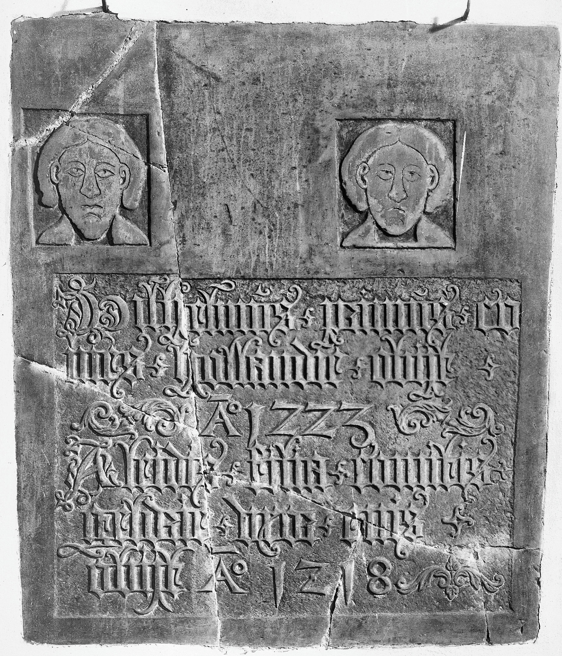 Nederlands Hervormde Kerk en Toren: stenen in het koor